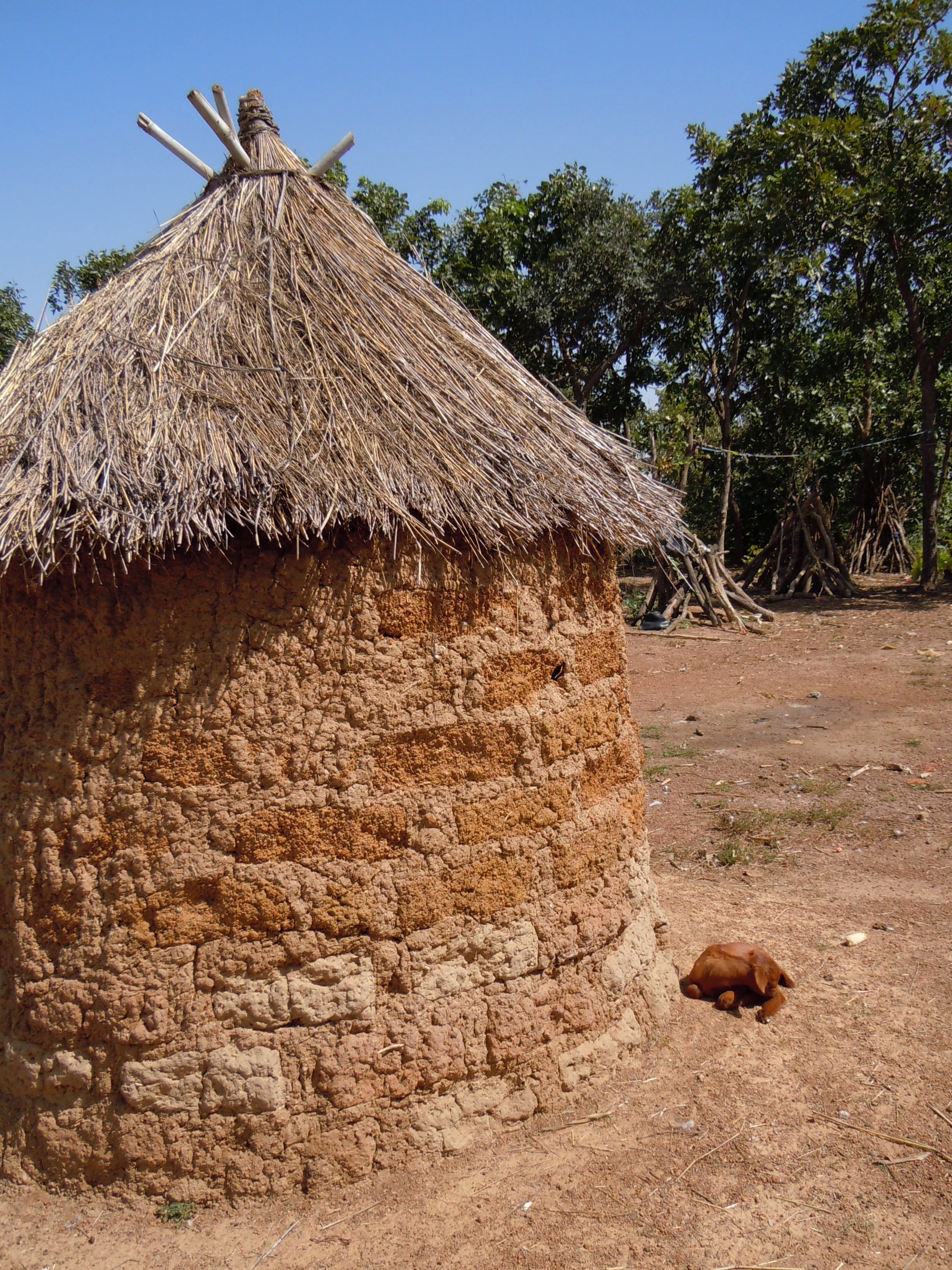 Foto: Heinrich-Böll-Stiftung